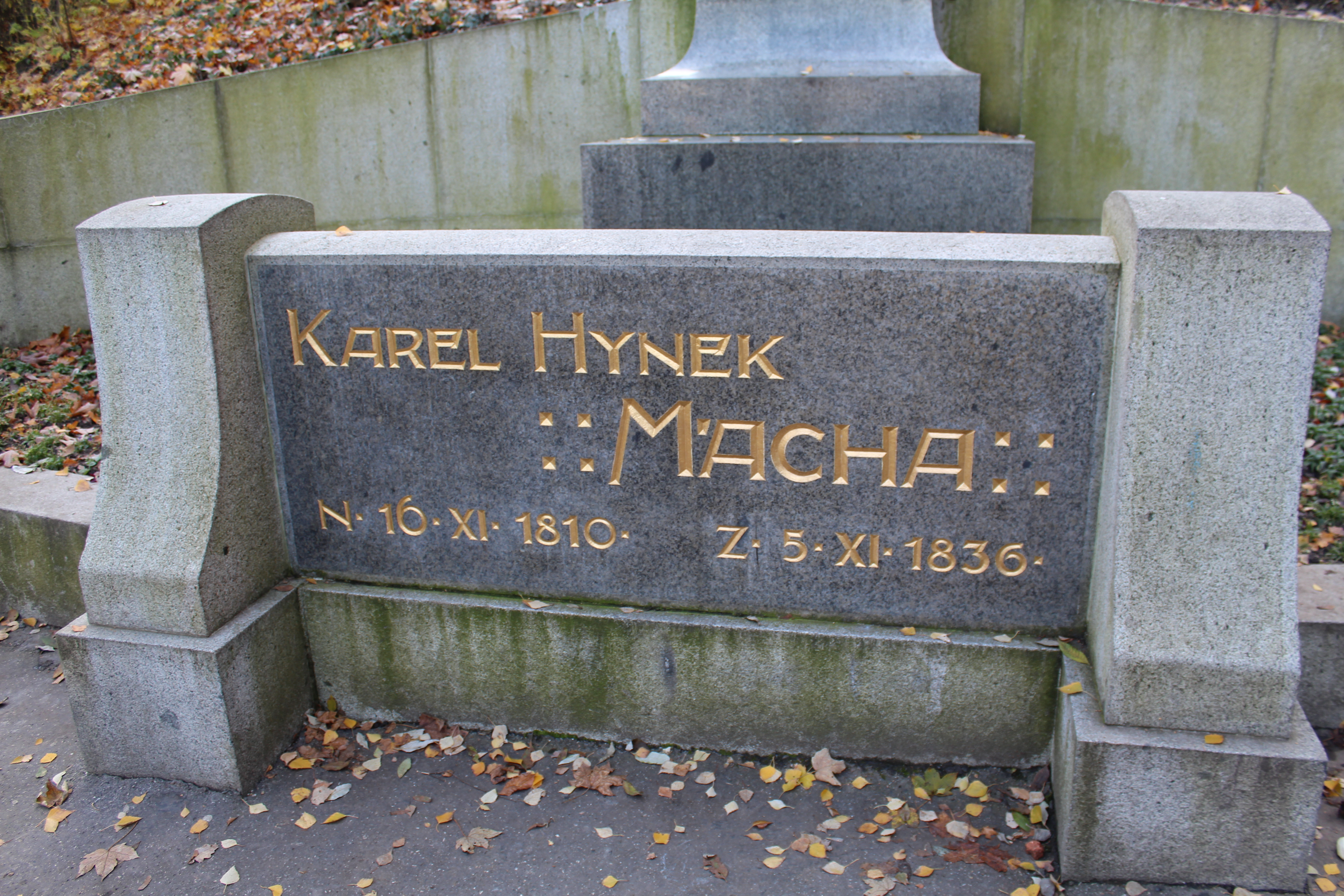 Monument en l'honneur de Karel Hynek Mácha à Prague.